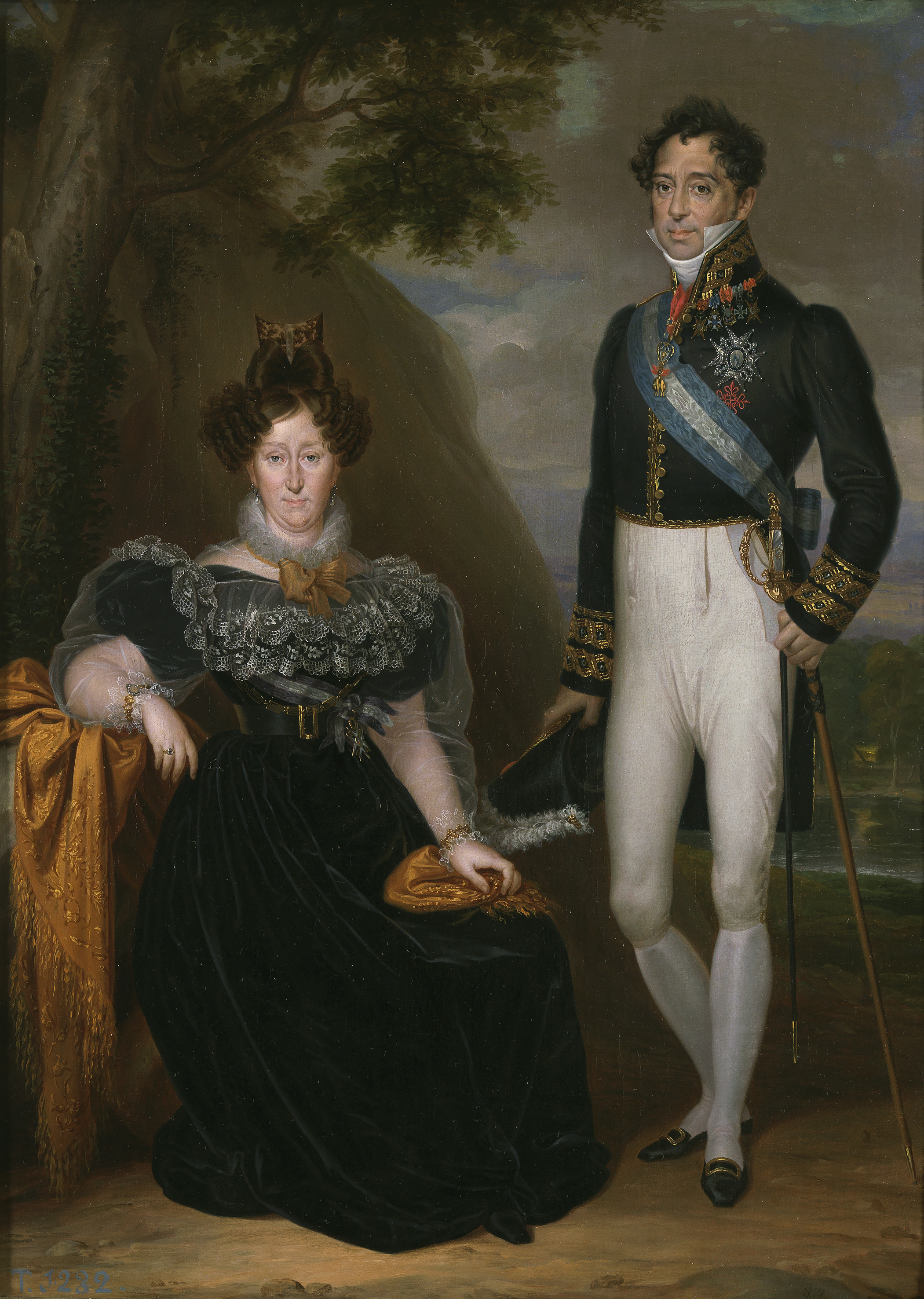 El lienzo representa a los duques de San Fernando de Quiroga, Joaquín José Melgarejo y Saurín y su esposa, María Luisa de Borbón y Vallabriga (1783-1846), nieta del rey Felipe V de España. Joaquín José Melgarejo y Saurín (1780-1835) fue marqués de Melgarejo, señor del castillo de Larache, de Cox, de La Condomina y de La Granja, Brigadier de los Reales Ejércitos, caballero de la Orden del Toisón de Oro, caballero de la Orden de Calatrava (1815), y caballero gran cruz de la Orden de Carlos III.